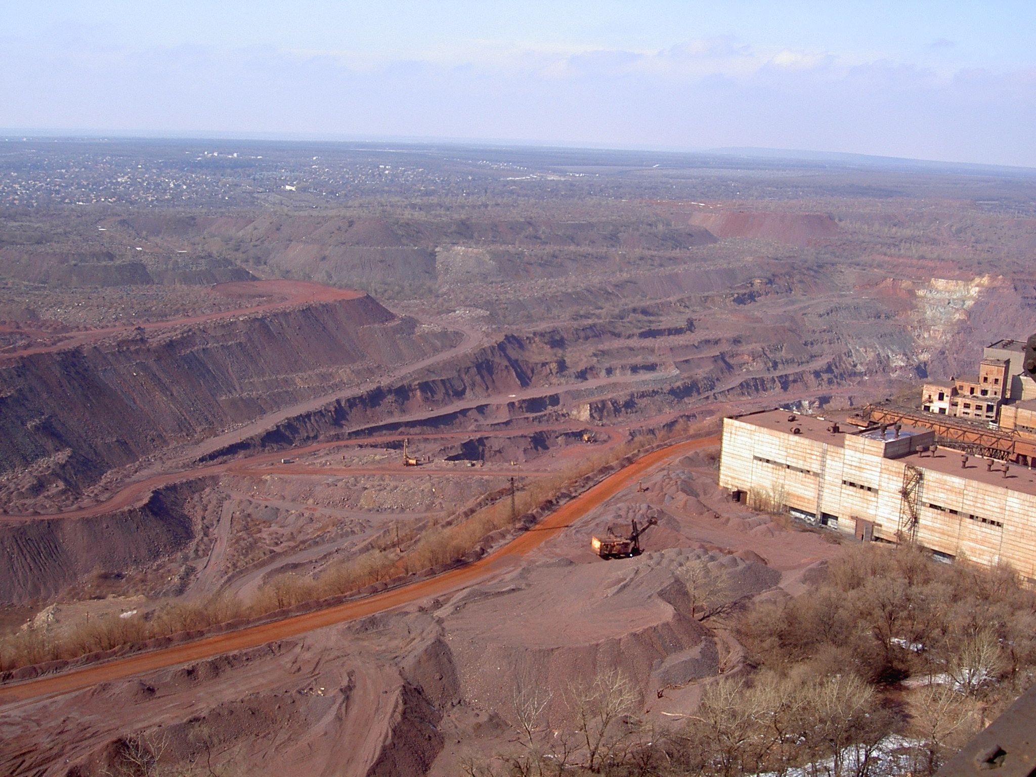 Общий вид на карьер "Северный" (северо-запад)